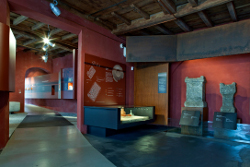 MUST museo del territorio Sala del mito delle Origini